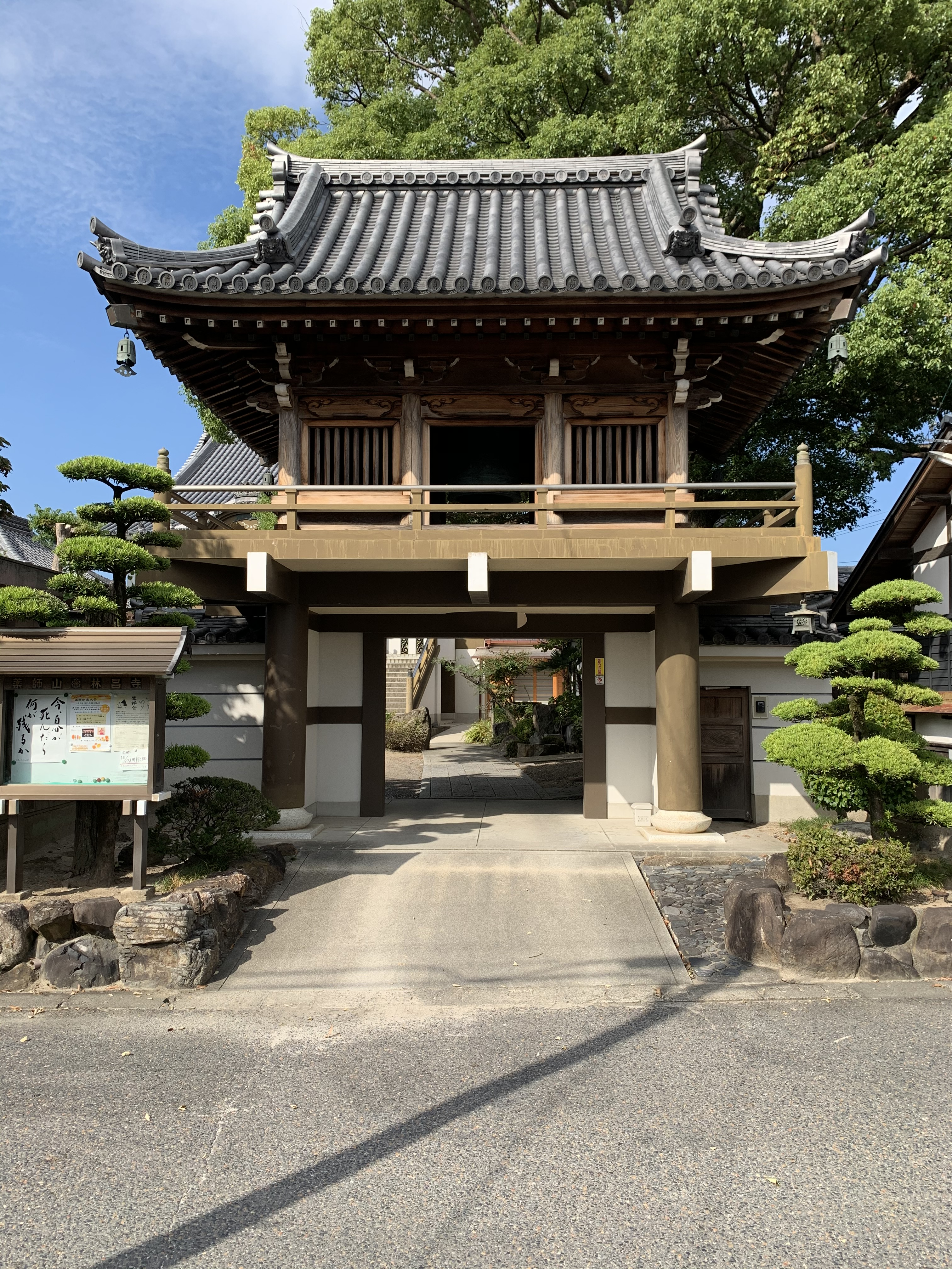 林昌寺の鐘橉門